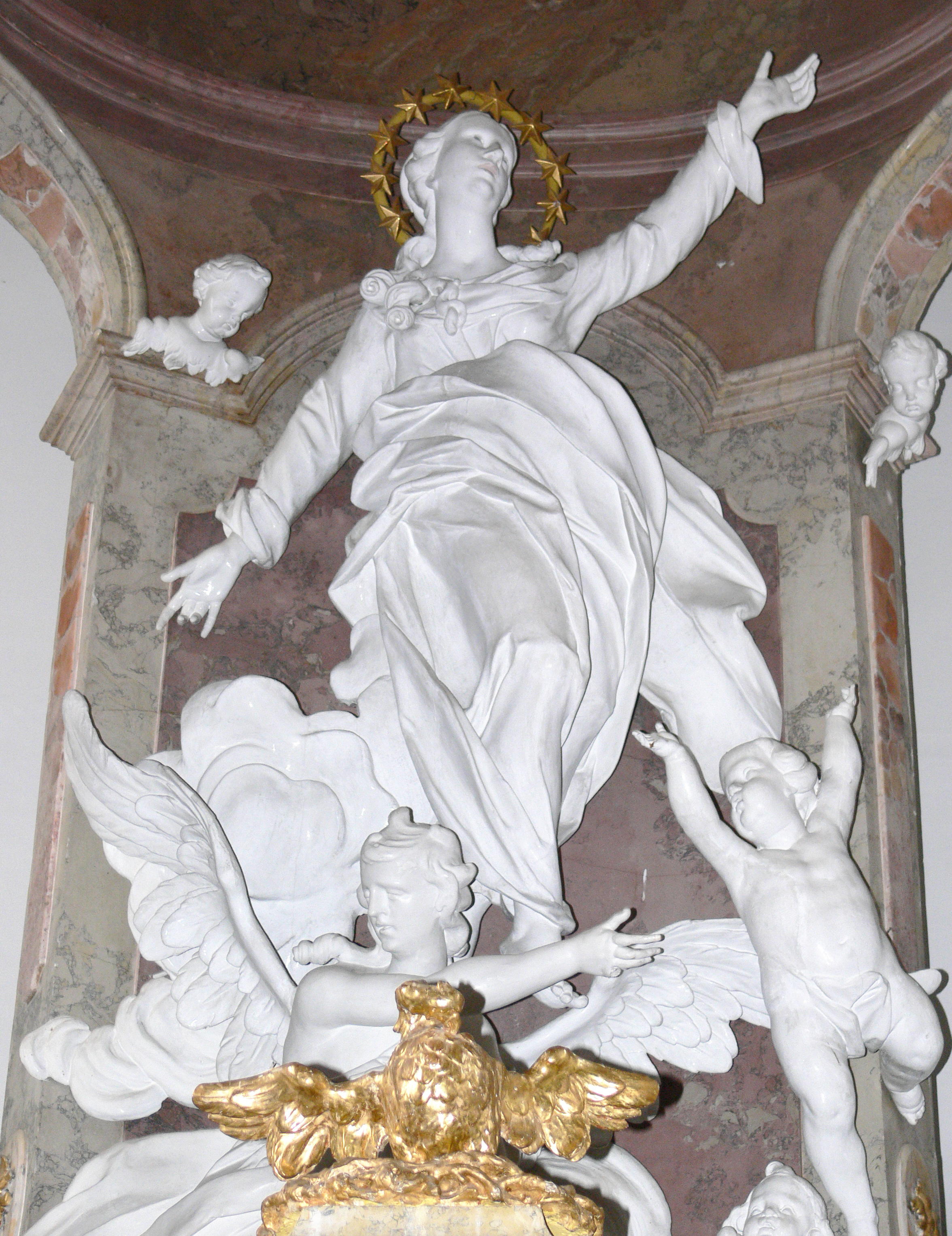 Pfarrkirche (ehem. Stiftskirche) St. Maria, Schloss Zeil, Leutkirch im Allgäu Hochaltargruppe "Mariens Aufnahme in den Himmel" von Joseph Anton Feuchtmayer, 1763–1764